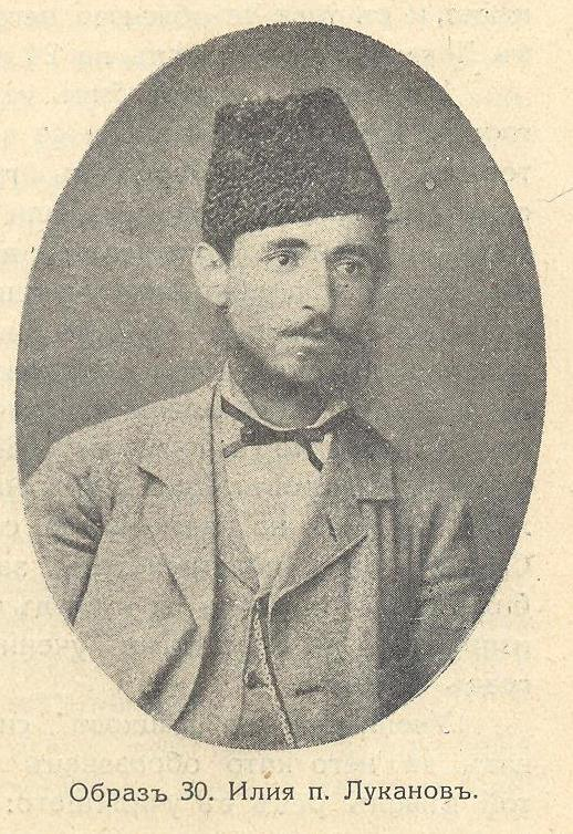 Ловеч и Ловчанско, книга 3, 1931, стр. 130 - Илия п. Луканов